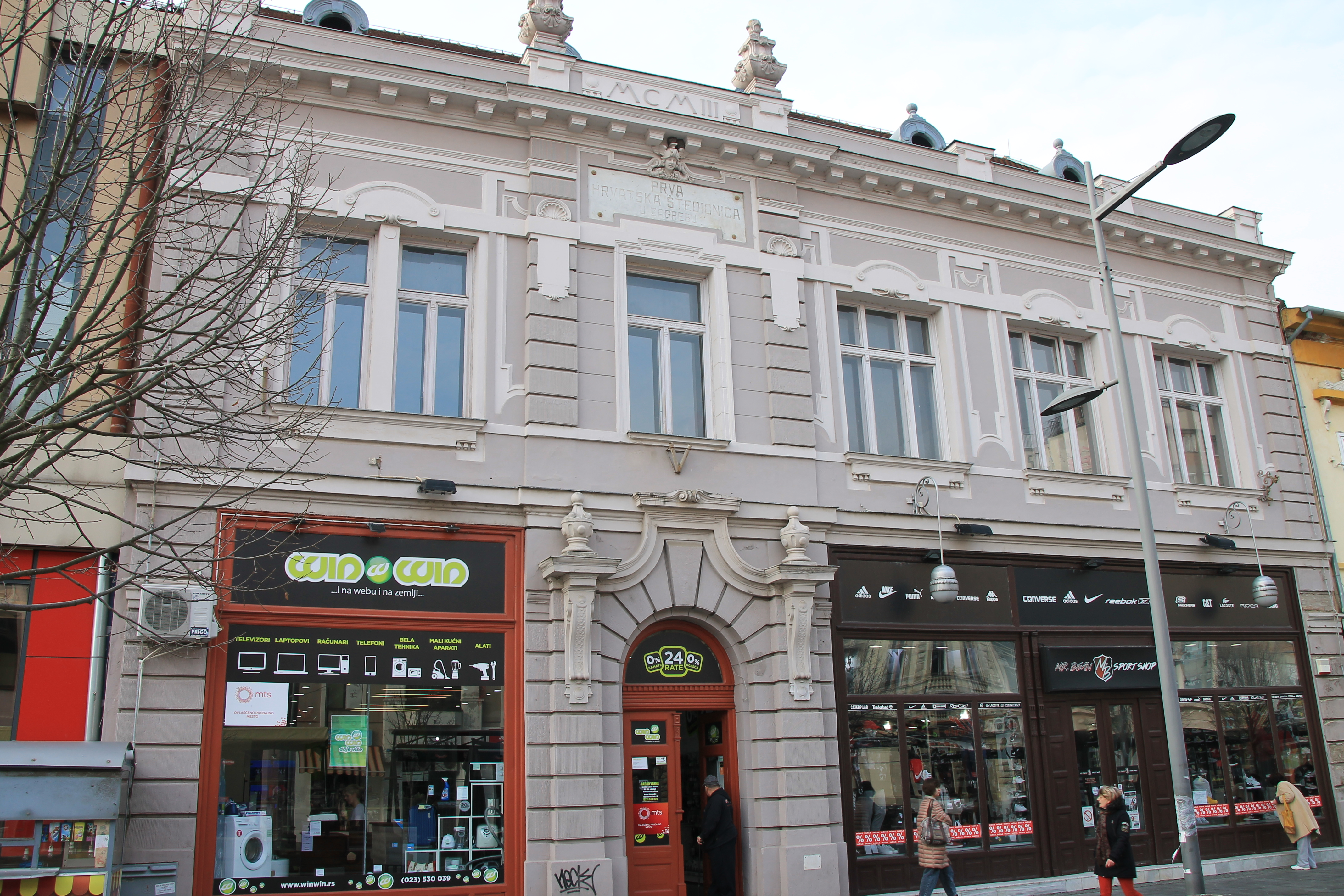 Staro jezgro Zrenjanina